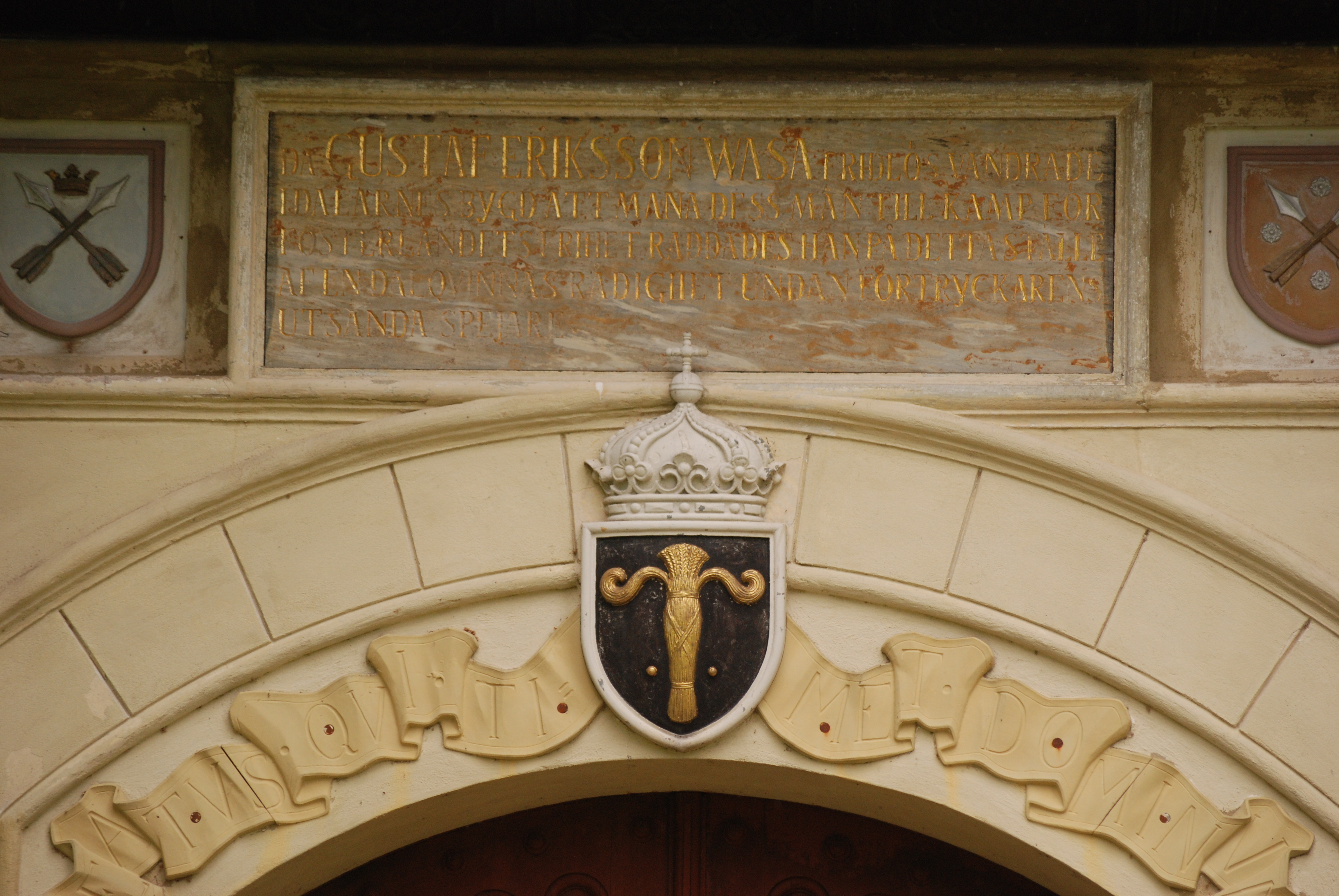 Inskription över porten till Utmelandsmonumentet i Mora. Den förgyllda texten lyder ”Då Gustaf Eriksson Wasa fridlös vandrade i Dalarnas bygd att mana dess män till kamp för fosterlandets frihet, räddades han på detta ställe af en Dalkvinnas rådighet undan förtryckarens utskickade spejare”